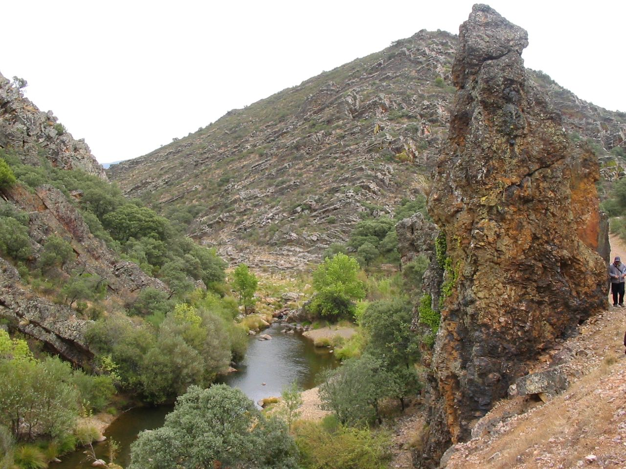 Navas de Estena, provincia de Ciudad Real, Castilla-La Mancha, España.